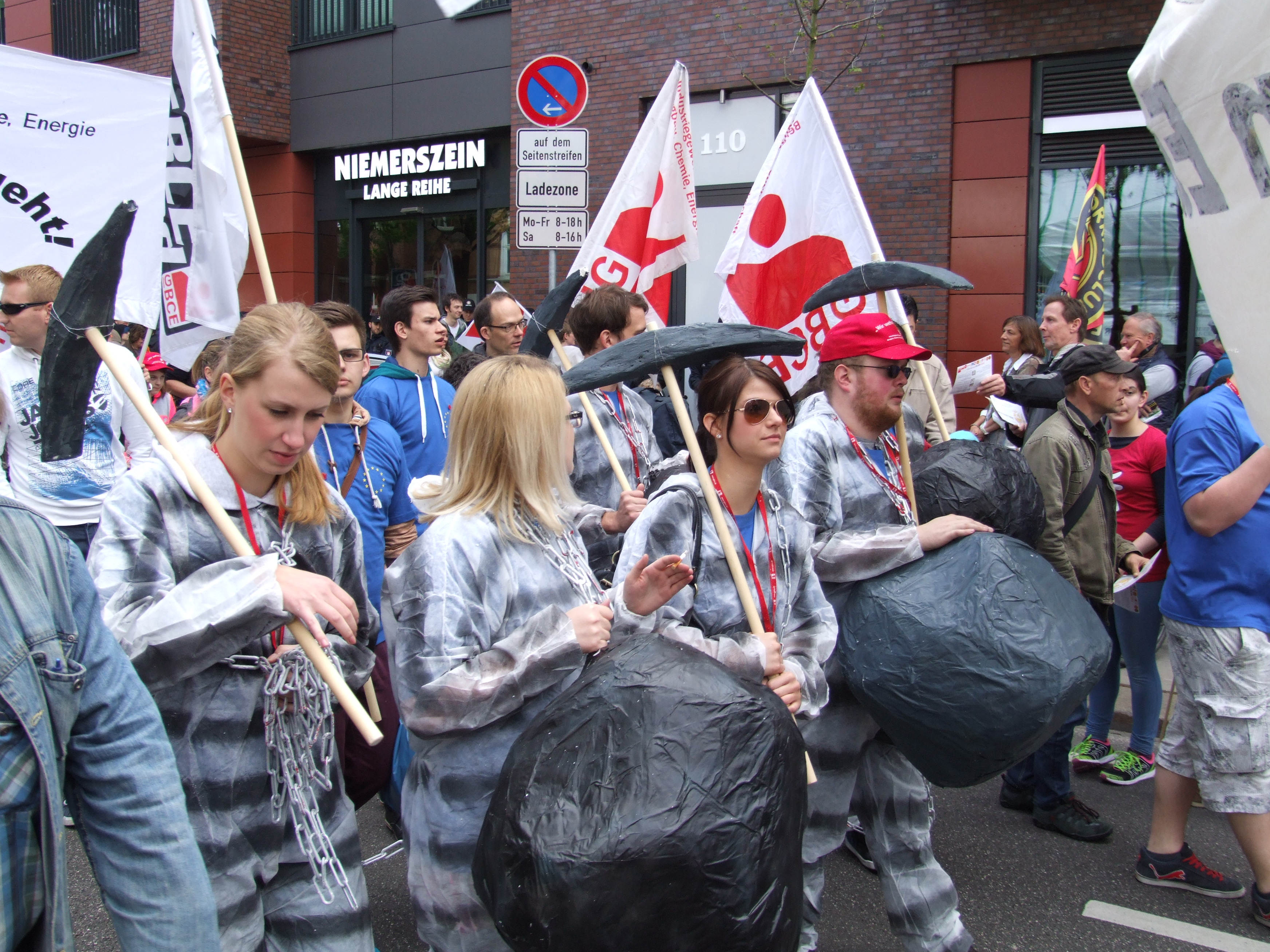 Tag der Arbeit 1. Mai 2014 - Demonstration in Hamburg - IG Bergbau, Chemie, Energie - IG BCE - Kampagne: Der steinige Weg aus der Jugendarbeitslosigkeit